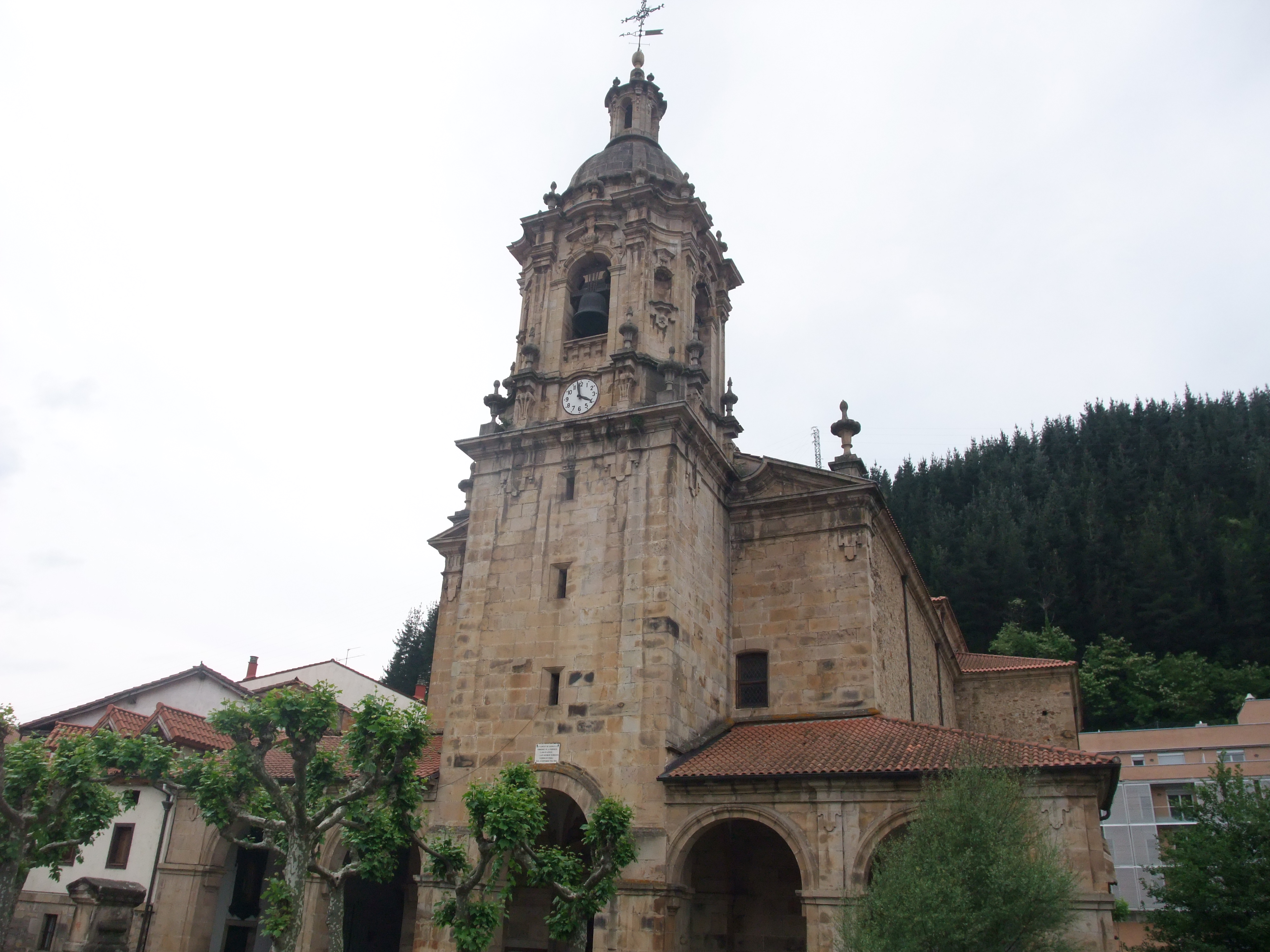 Escoriaza (Guipúzcoa)-Iglesia de San Pedro